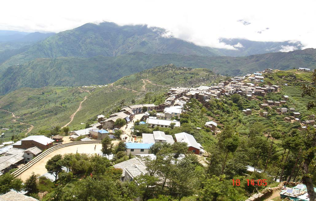 नेपाली: कालिकोट जिल्ला सदरमुकाम । सौजन्य:जिविस कालिकोट